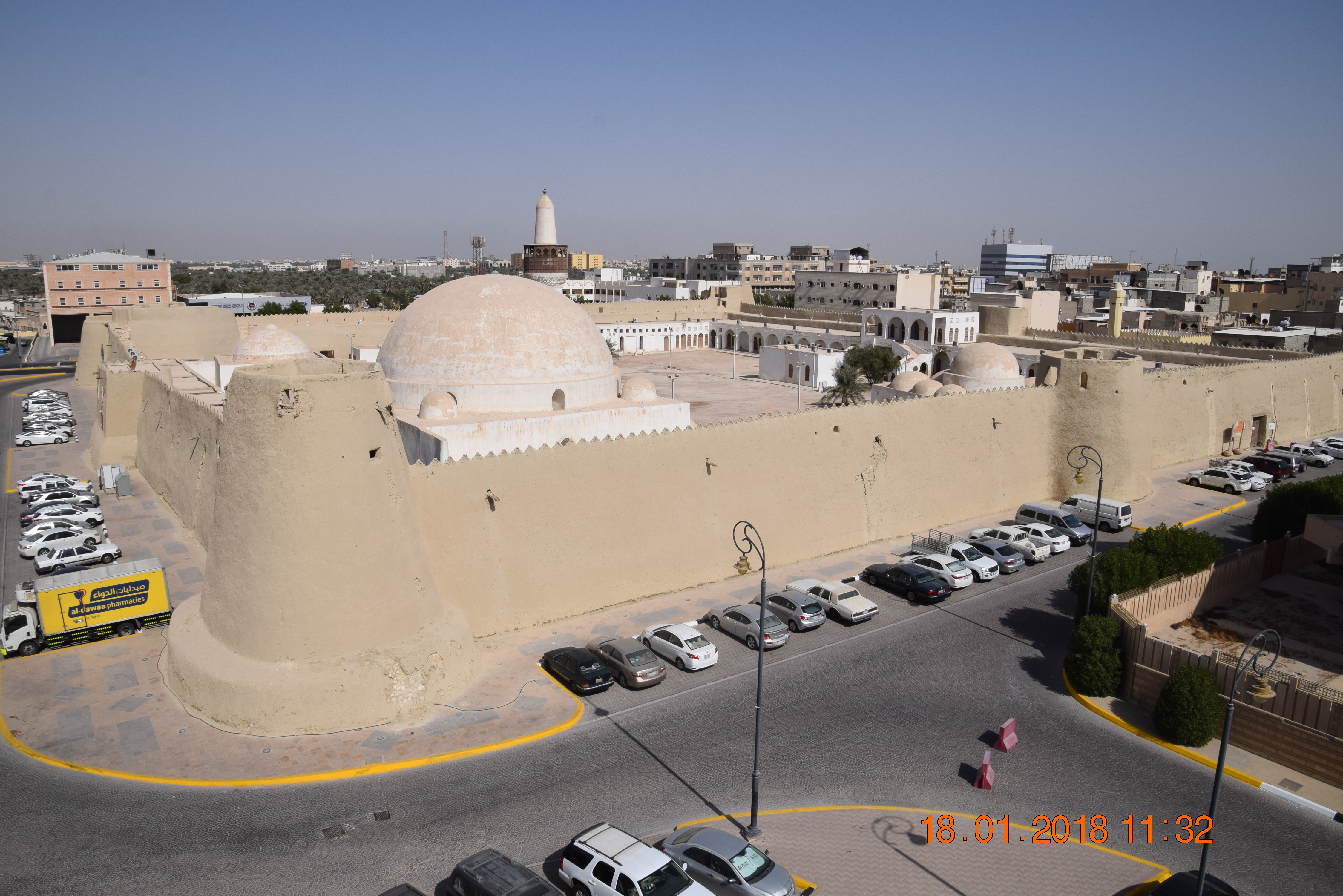 قصر إبراهيم الأثري أو قصر القبة أو قصر الكوت أو قلعة إبراهيم، هو قصر تاريخي وأحد آثار الأحساء بالمنطقة الشرقية في السعودية.